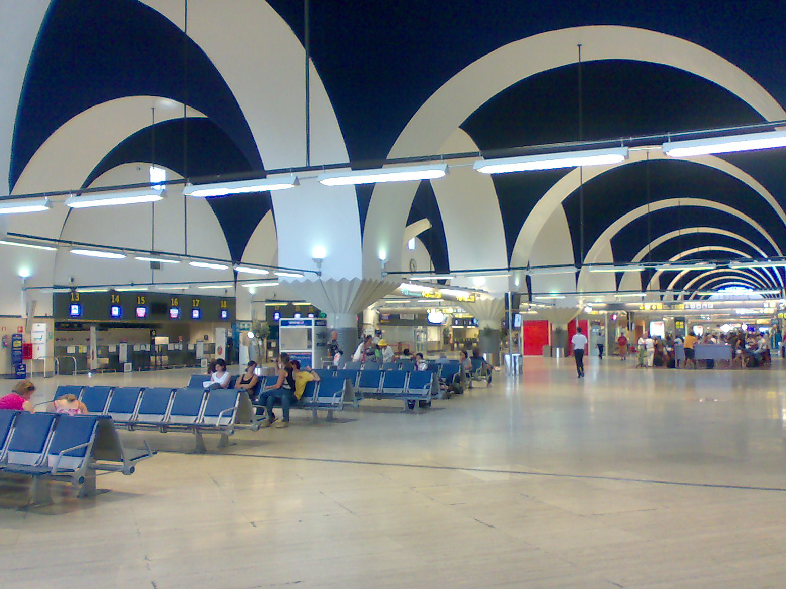 Terminal de salidas del aeropuerto de Sevilla.